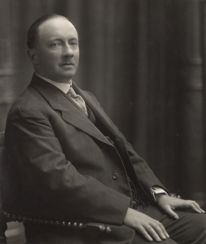 Lord Portal